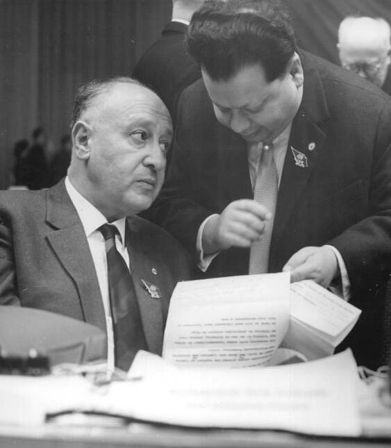 Zentralbild Kollektiv Me-At 15.1.1963 VI. Parteitag der SED vom 15.-21.1.1963 in der Werner-Seelenbinder-Halle in Berlin (1.Tag) UBz: Während einer Tagungspause im Gespräch (links) das Mitglied des Politbüros des ZK der SED Albert Norden und das Mitglied des Zentralkomitees der SED und Chefredakteur des "Neuen Deutschland" Herrmann Axen. (Sturm)"